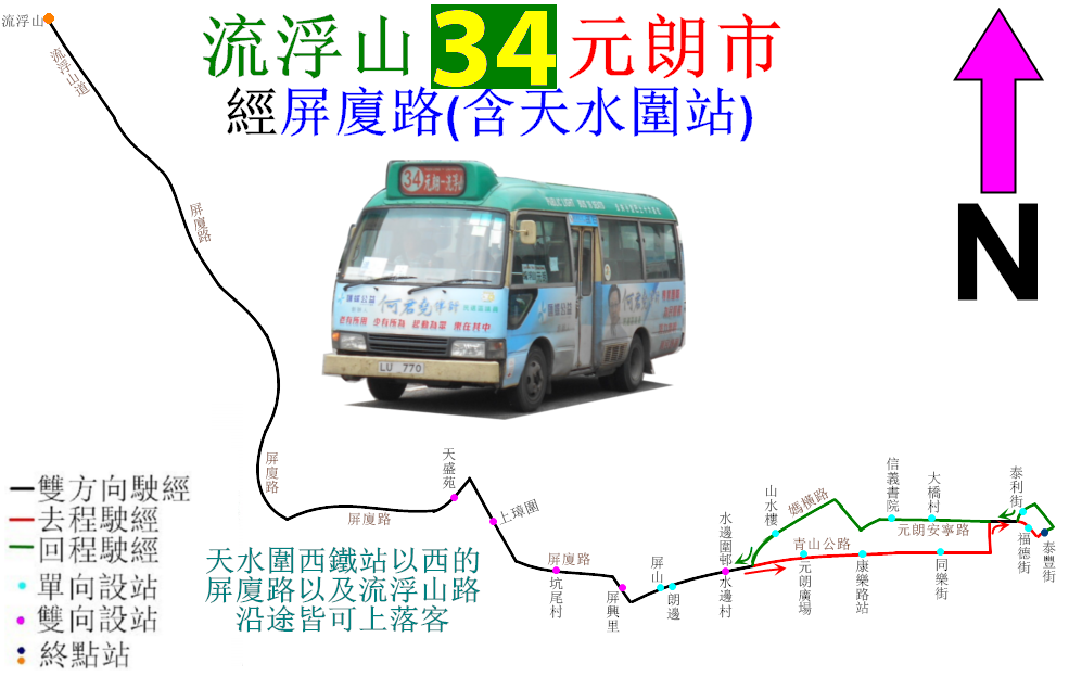 中文（香港）: 新界專線小巴34線的走線圖